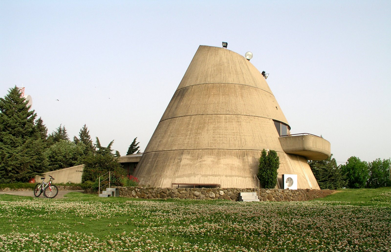 בית התרבות במושב יונתן